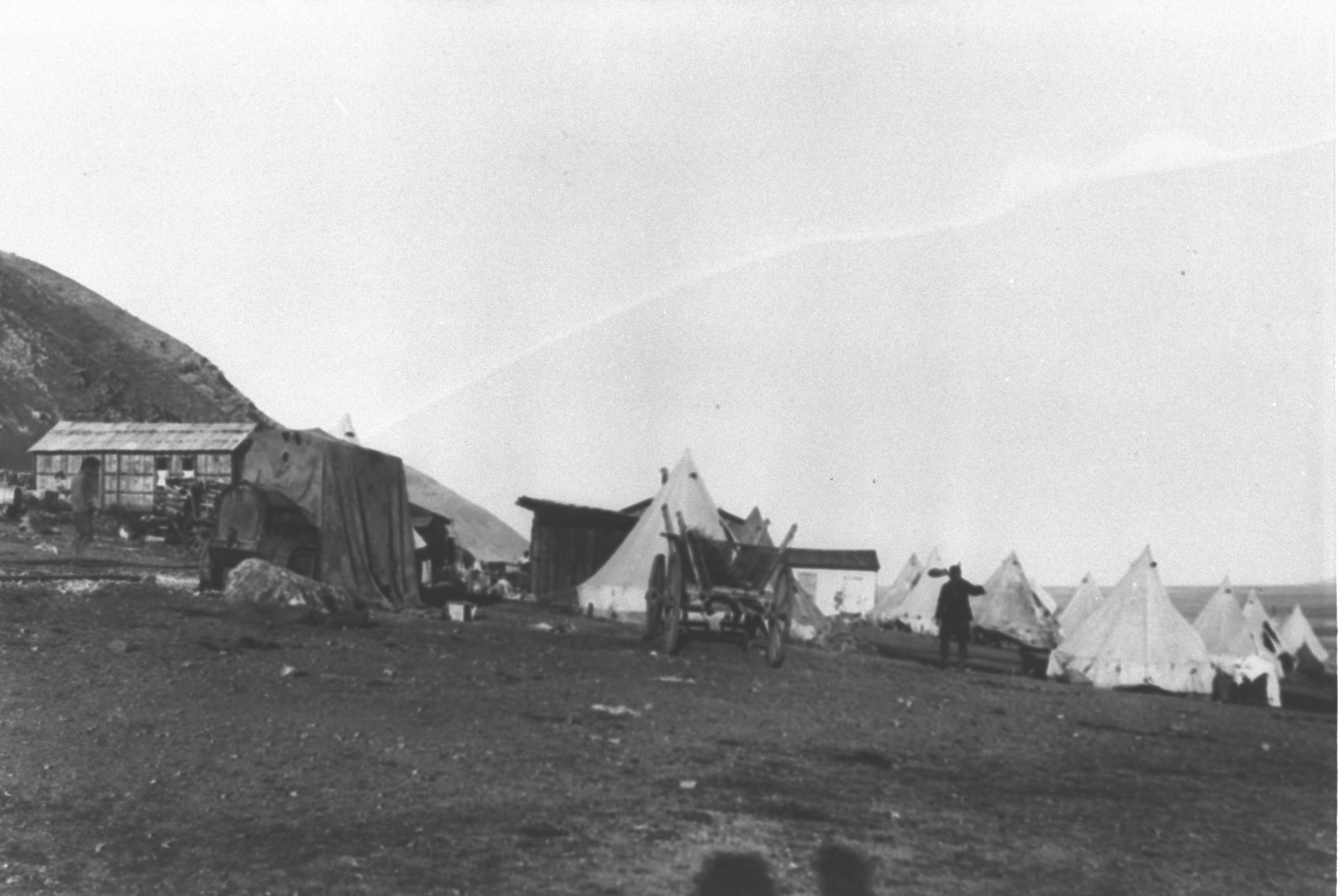 קיבוץ בית אלפא 1923